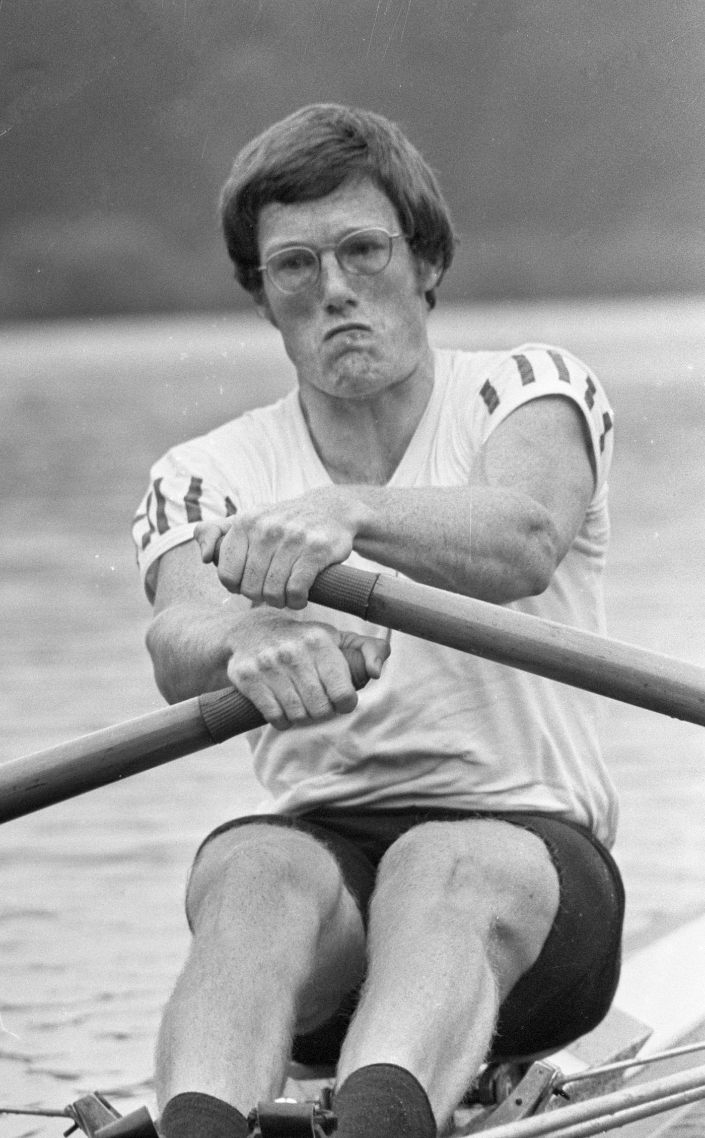 Nationale Roeikampioenschappen op Bosbaan, Paul Veeneman in aktie skif